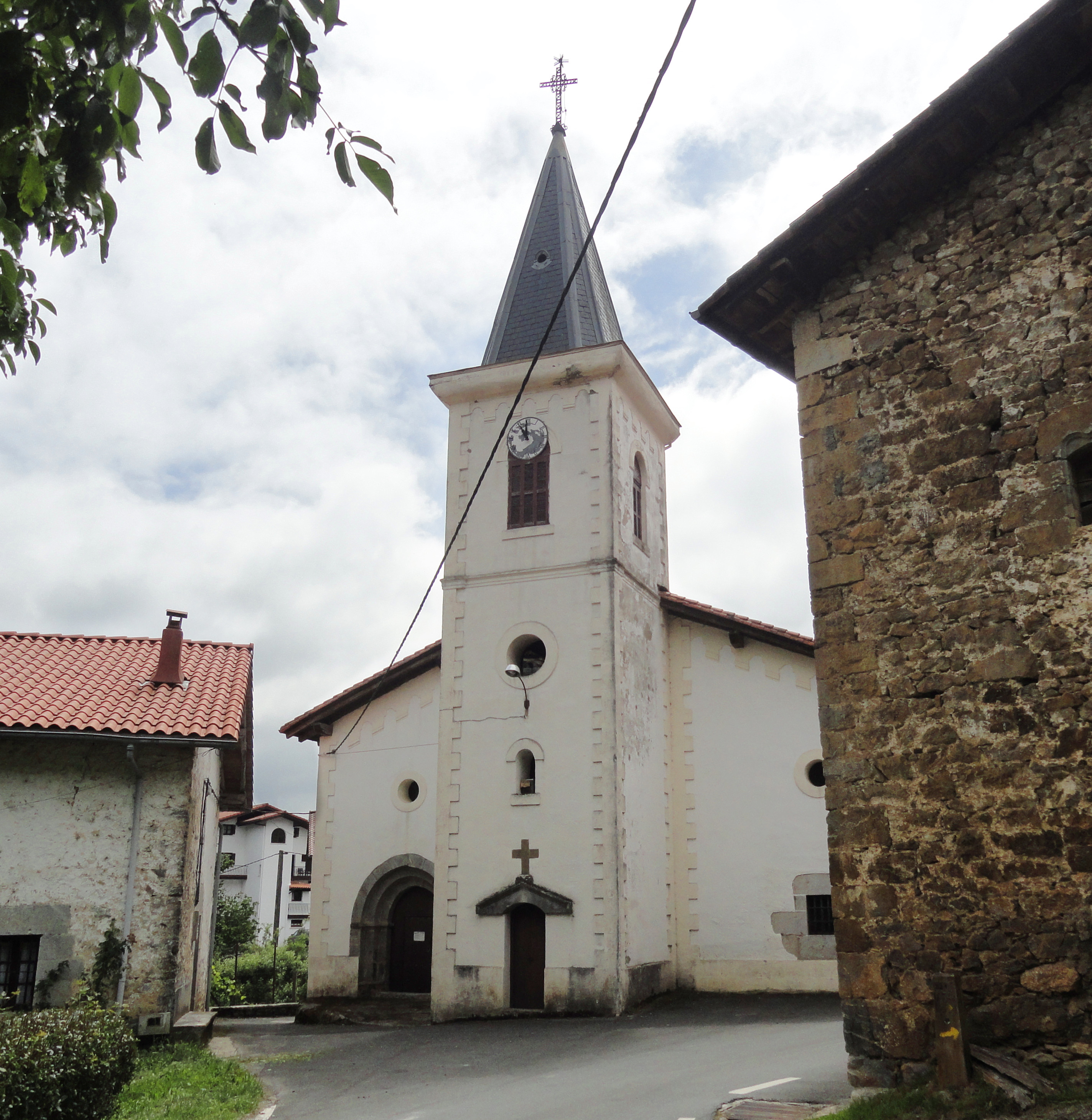 Argisaingo Santa Marinaren eliza - Albiztur